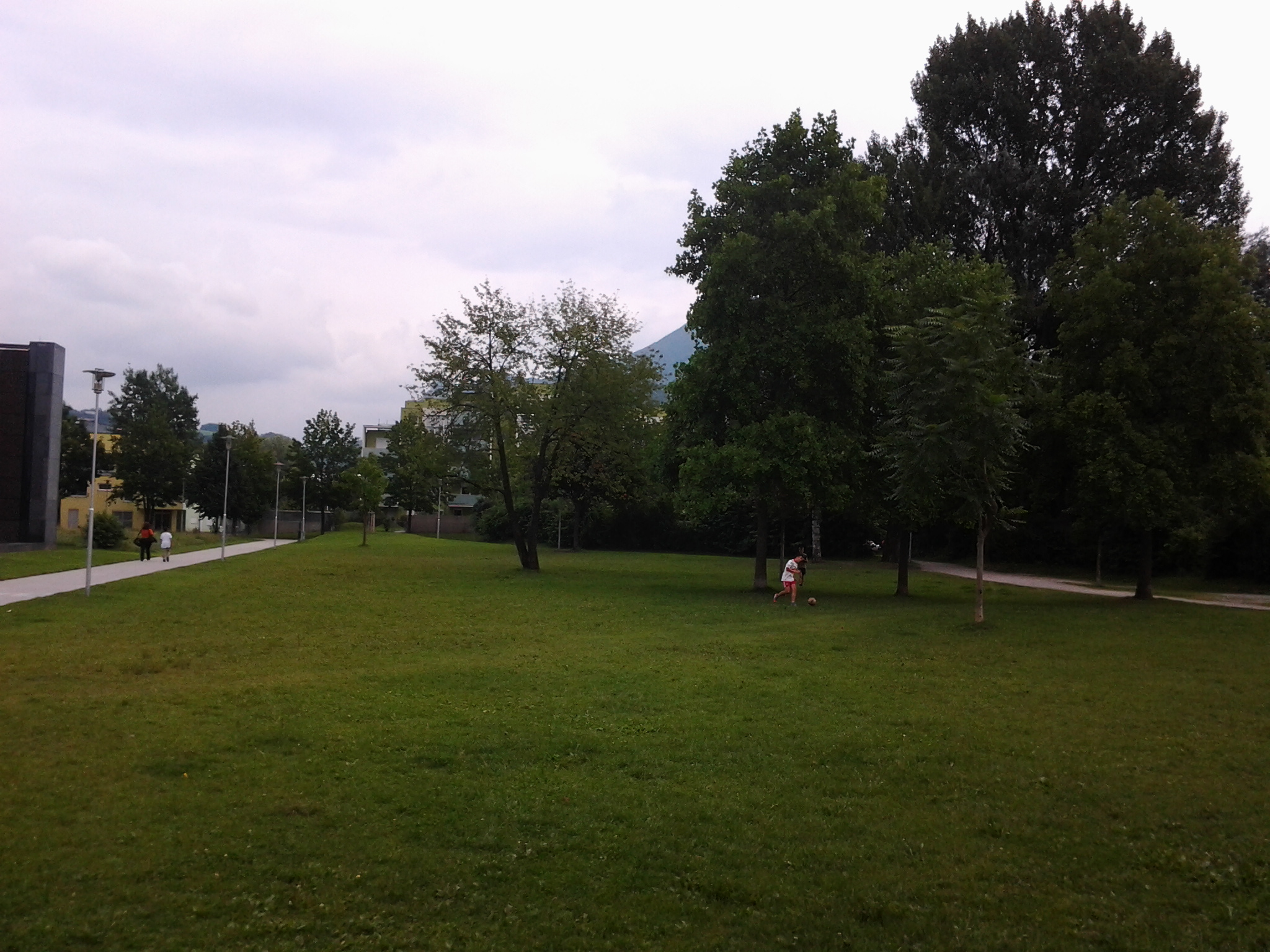 Der Dr.-Hans-Lechner-Park im Salzburger Stadtteil Schallmoos ist ein kleiner Naherholungsraum, benannt nach dem ehemaligen Salzburger Landeshauptmann.